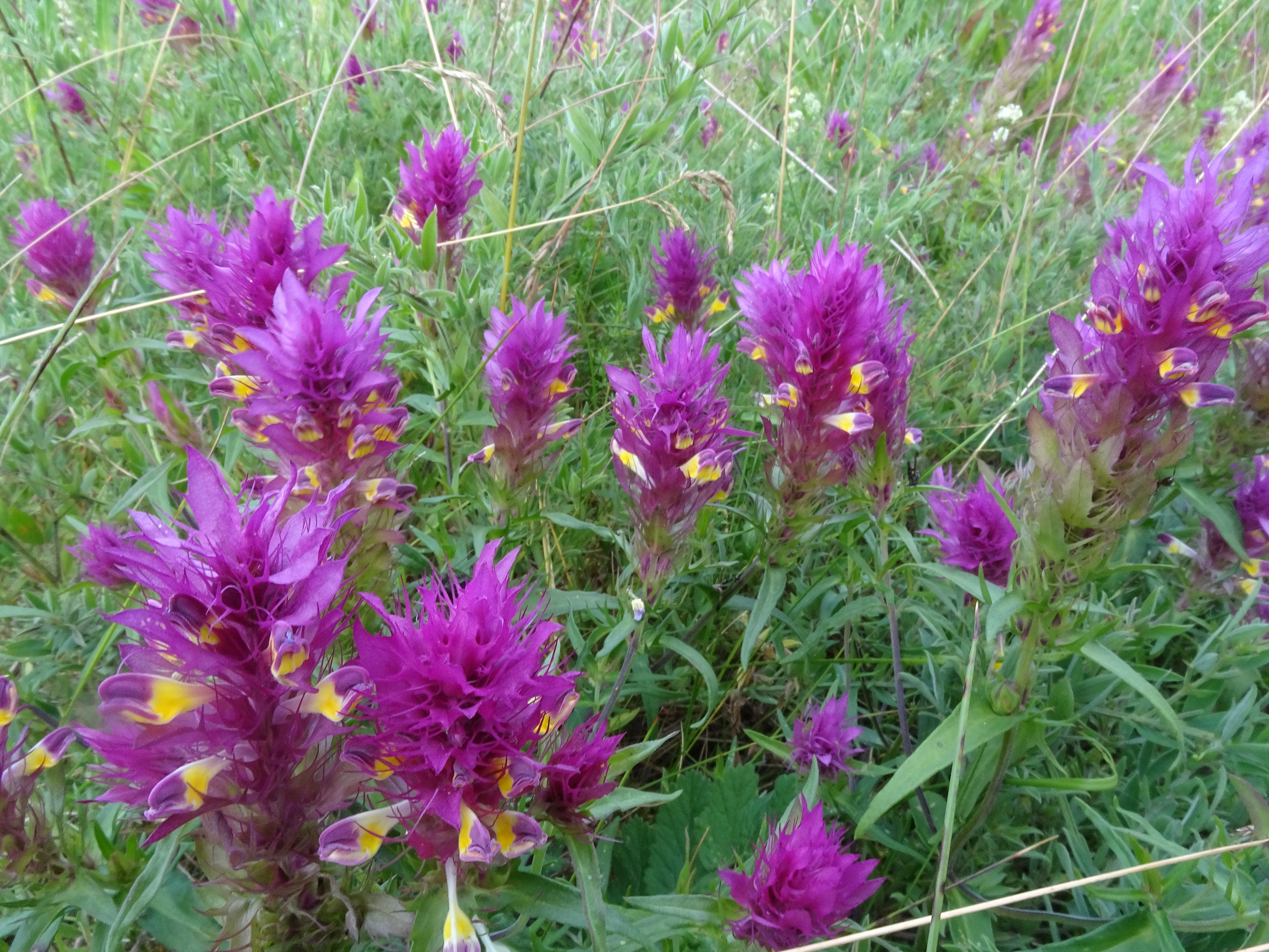 Põld-härghein (Melampyrum arvense) Saaremaal Jaani külas kadakasel heinamaal